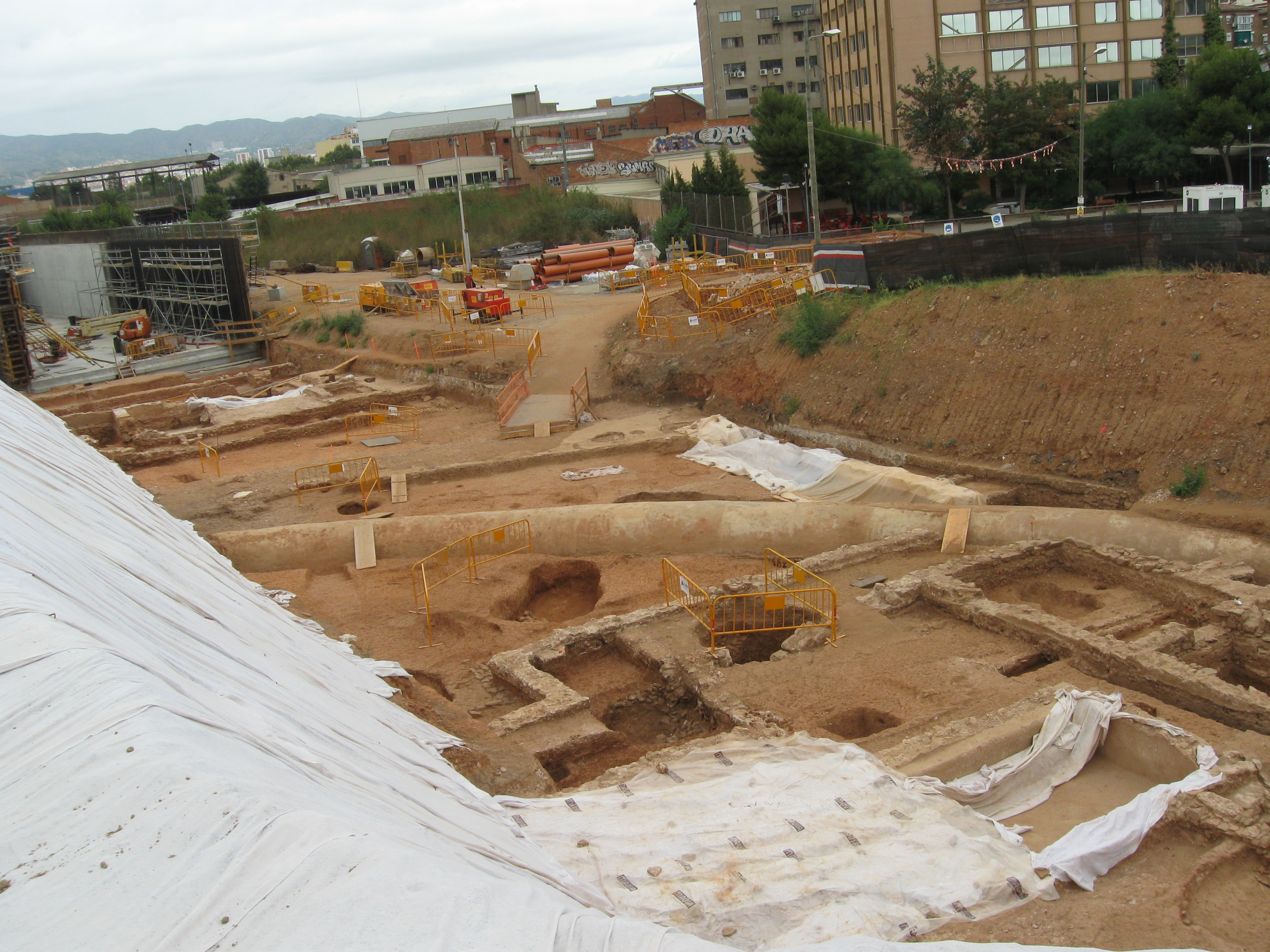 Vista general del jaciment de la vil·la romana de la Sagrera.